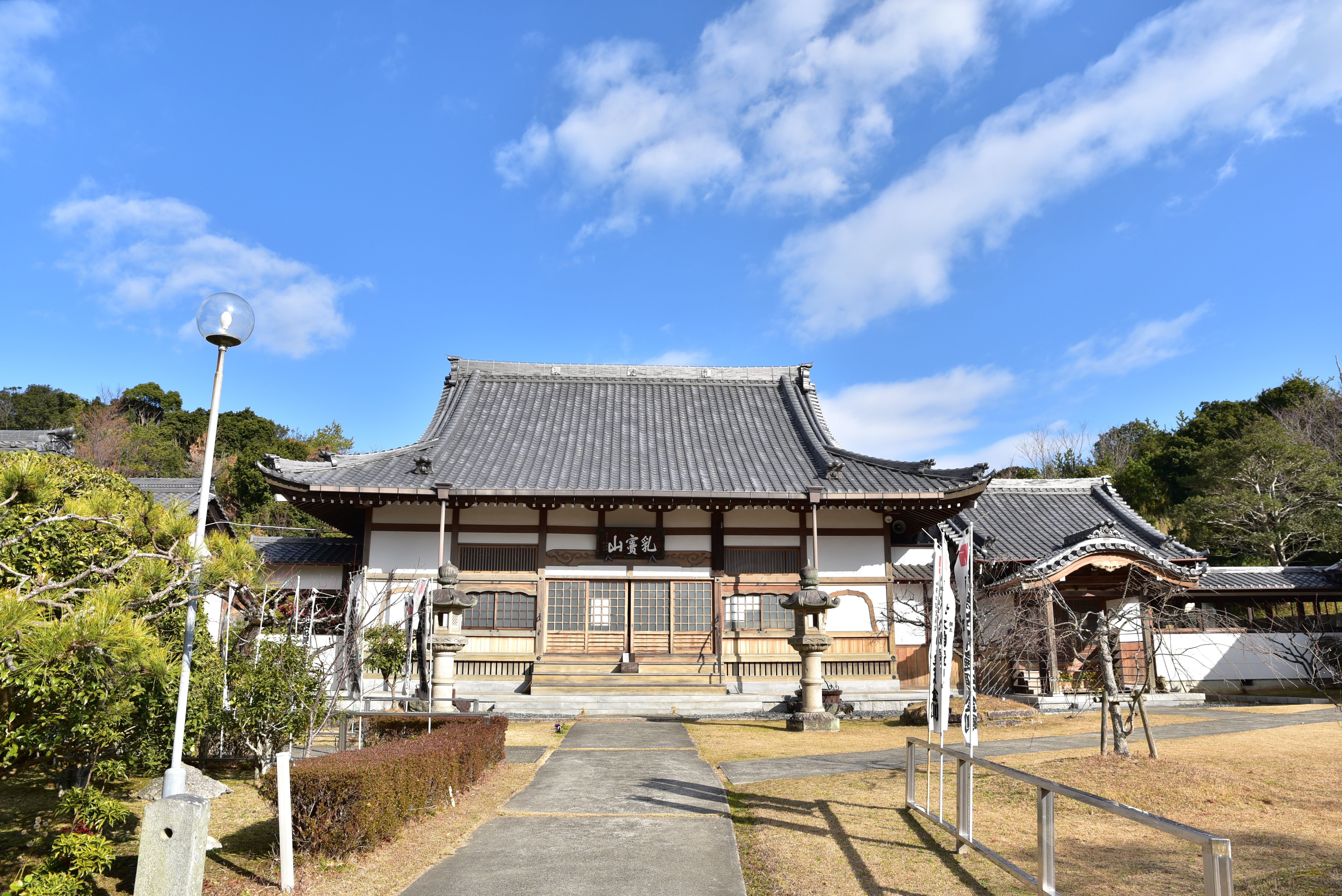 報恩寺本堂